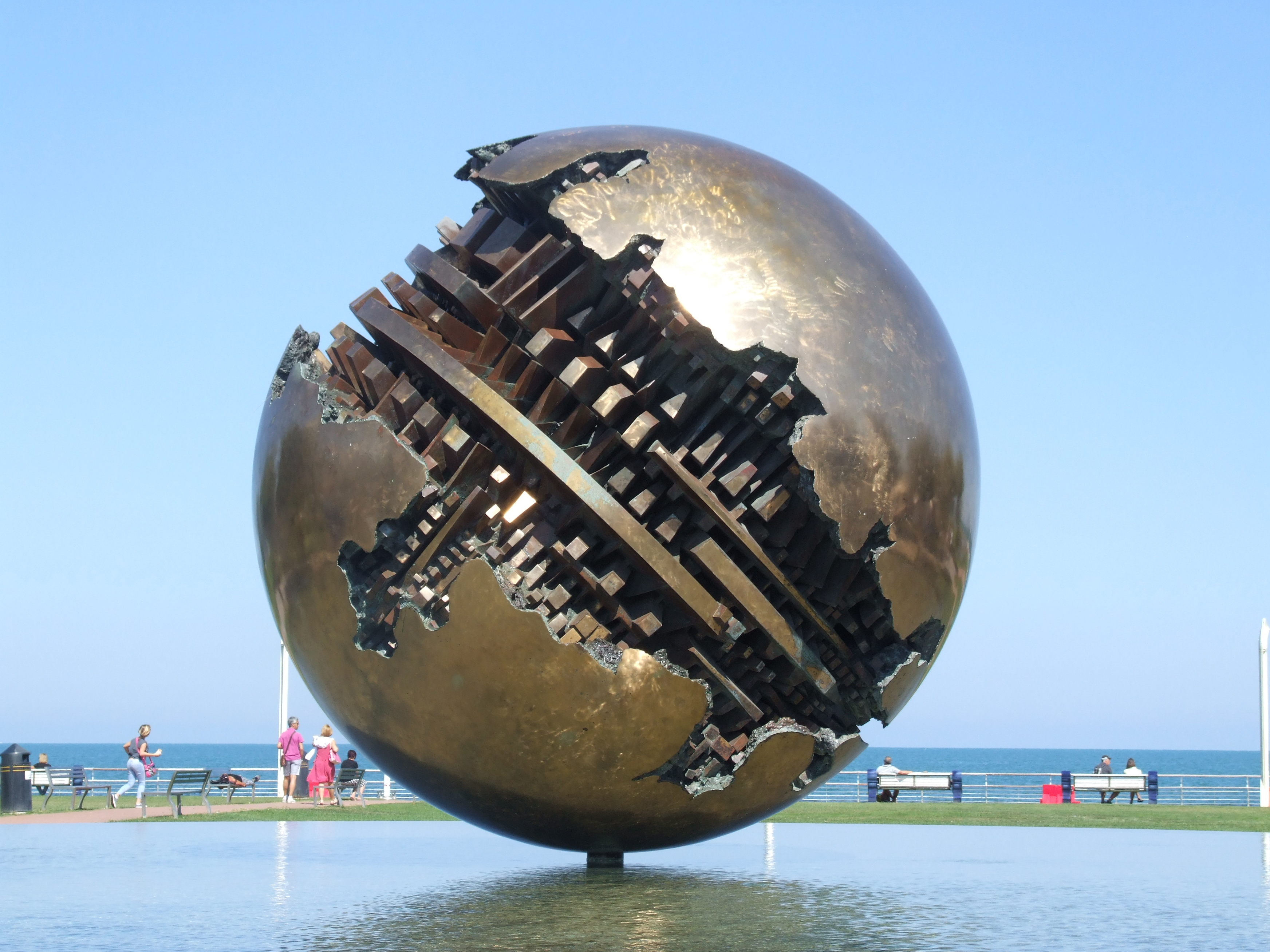 Sfera Grande di Pomodoro This is a photo of a monument which is part of cultural heritage of Italy.